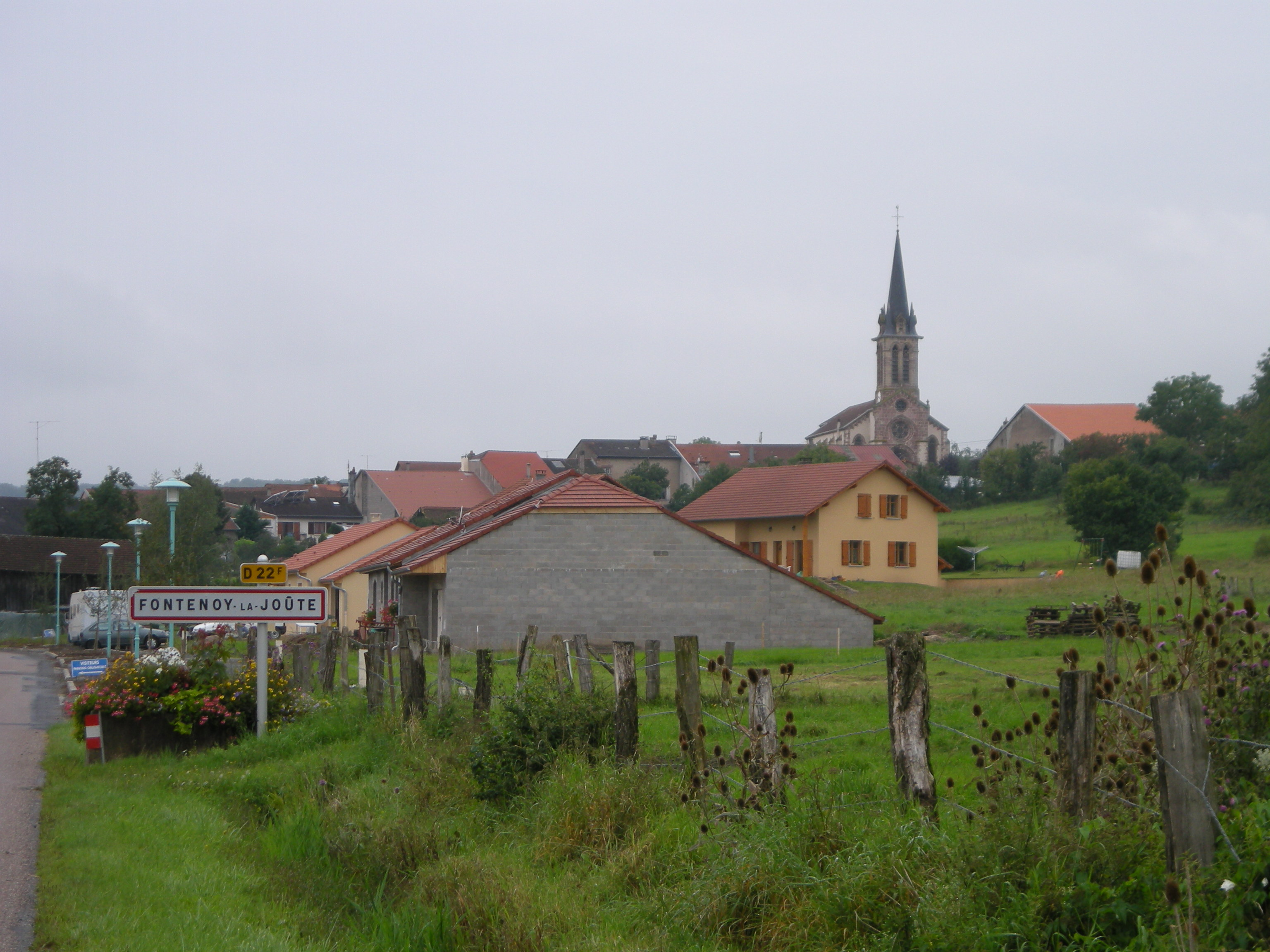 L'église du village de Fontenoy-la-Joûte (Meurthe-et-Moselle, France)